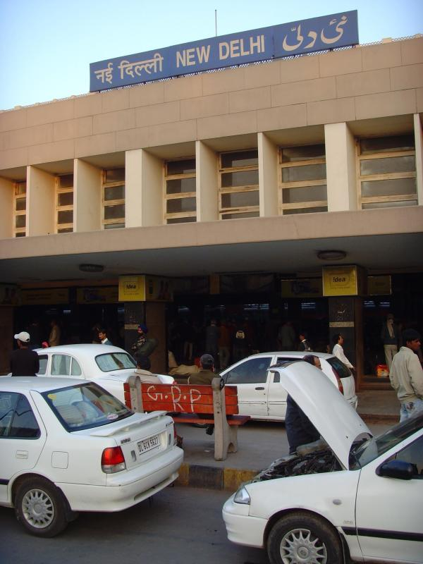 New Delhi - Hauptbahnhof